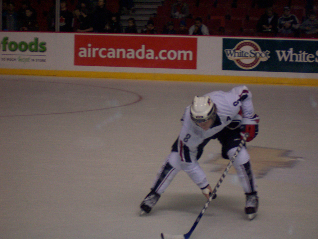 Phil Kessel